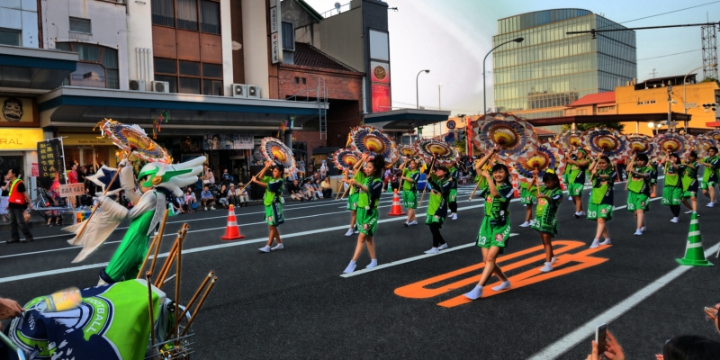 鳥取県鳥取市の鳥取しゃんしゃん祭(2013年)